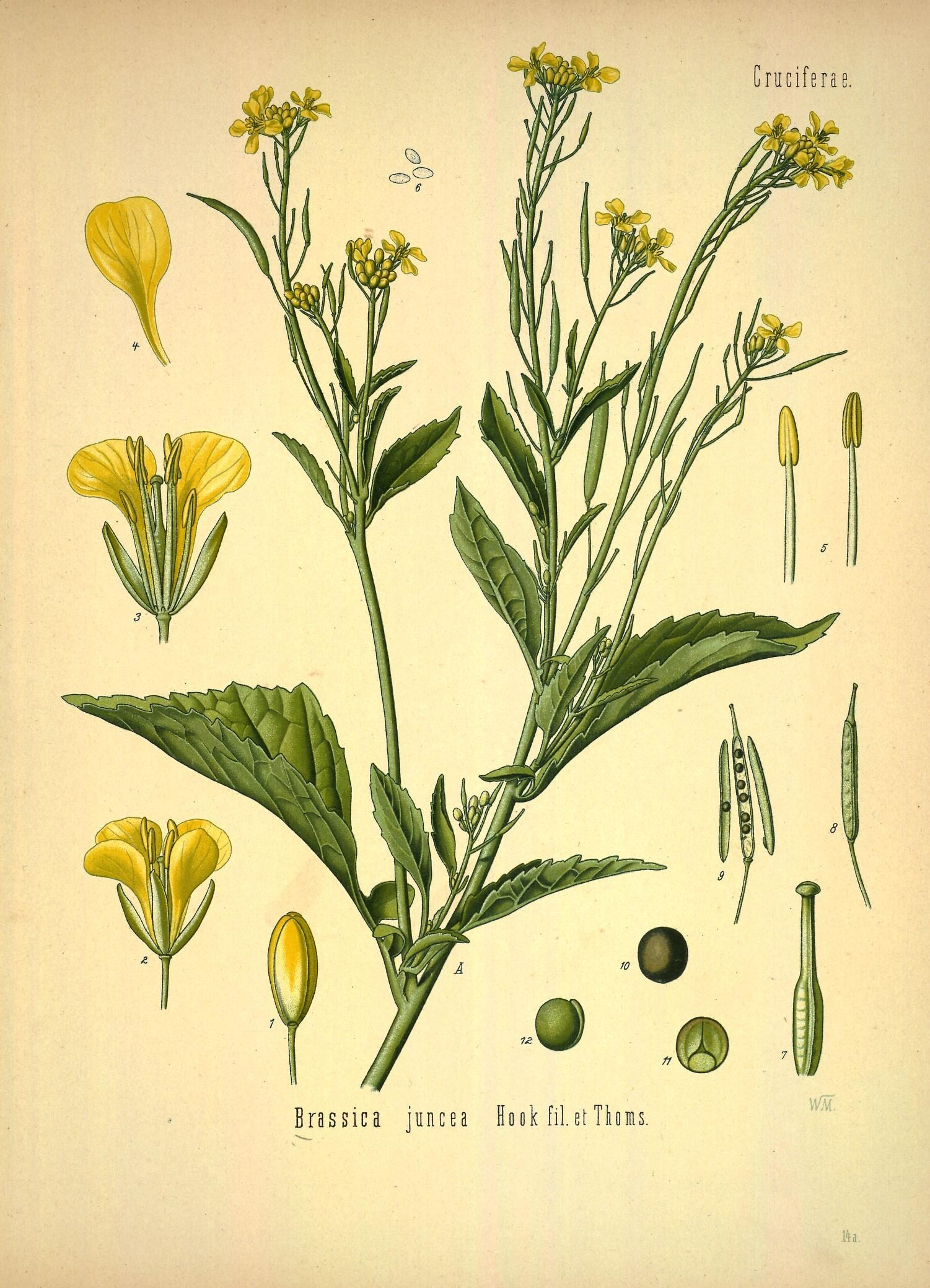 Sareptasenf. A oberer Theil der Pflanze mit Blüthen und Früchten, natürl. Grösse; 1 Blüthenknospe, vergrössert; 2 Blüthe, desgl.; 3 dieselbe im Längsschnitt, desgl.; 4 Kronblatt, desgl.; 5 Staubgefässe von verschiedenen Seiten, desgl.; 6 Pollen, desgl.; 7 Stempel, desgl.; 8 Frucht, natürl. Grösse; 9 dieselbe geöffnet, desgl.; 10 Same, vergrössert; 11, 12 derselbe ohne Samenschale, desgl.